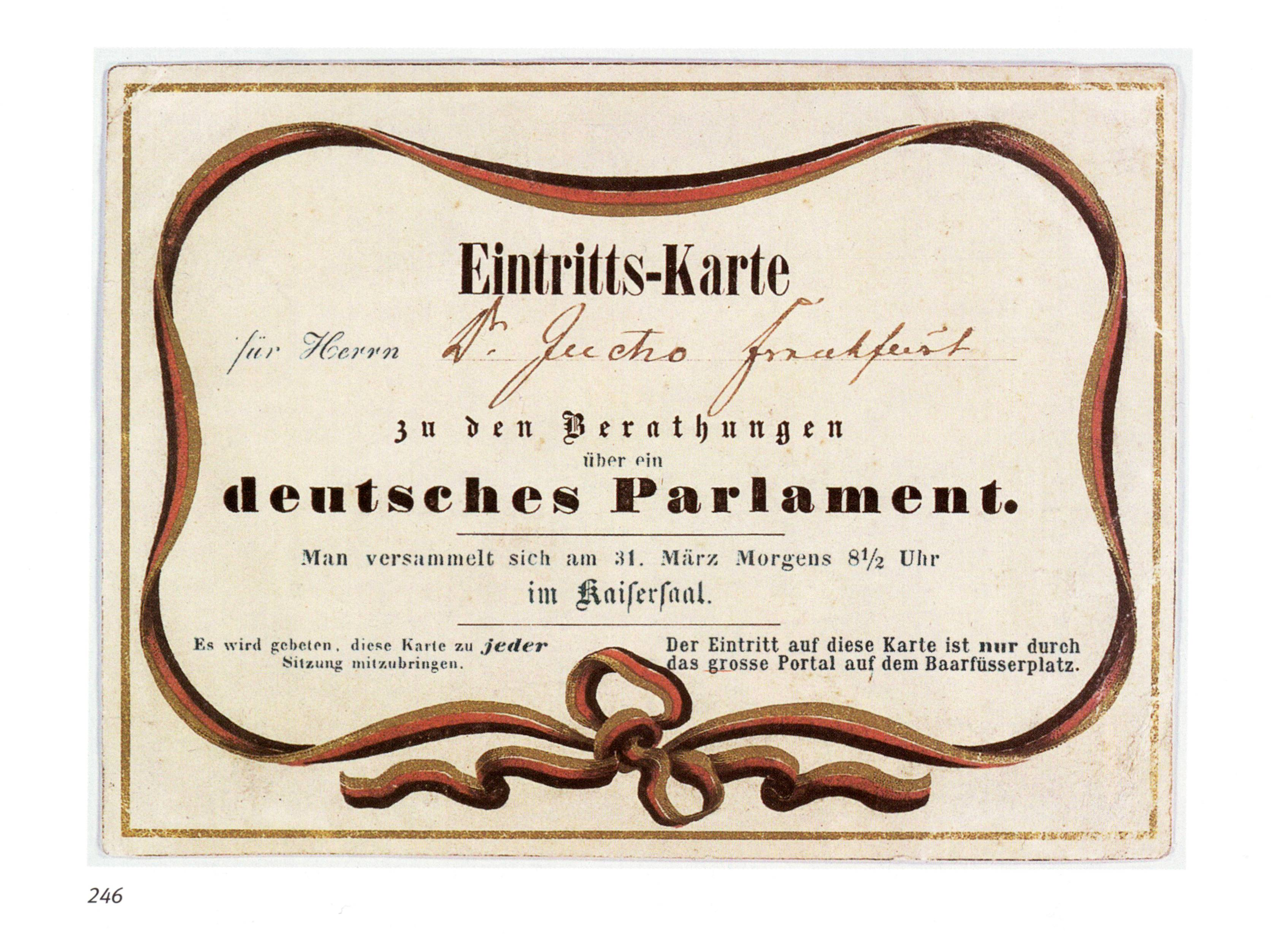 “Eintritts-Karte für Herrn Dr. Jucho Frankfurt zu den Berathungen über ein deutsches Parlament” (Vorparlament)